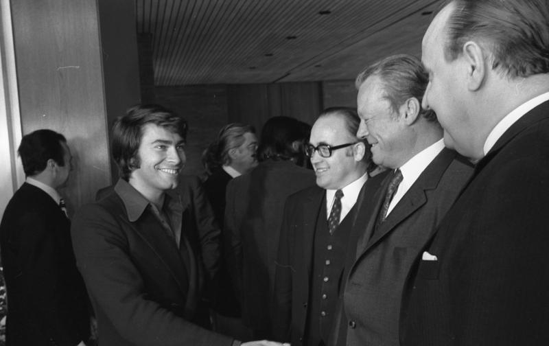 Bundeskanzler Willy Brandt empfängt Filmschauspieler